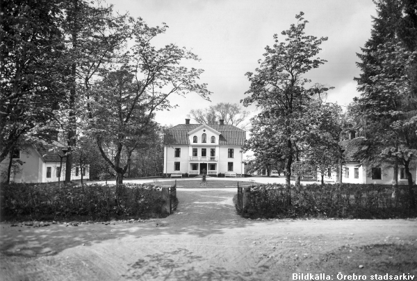 Källtorps herrgård 1933